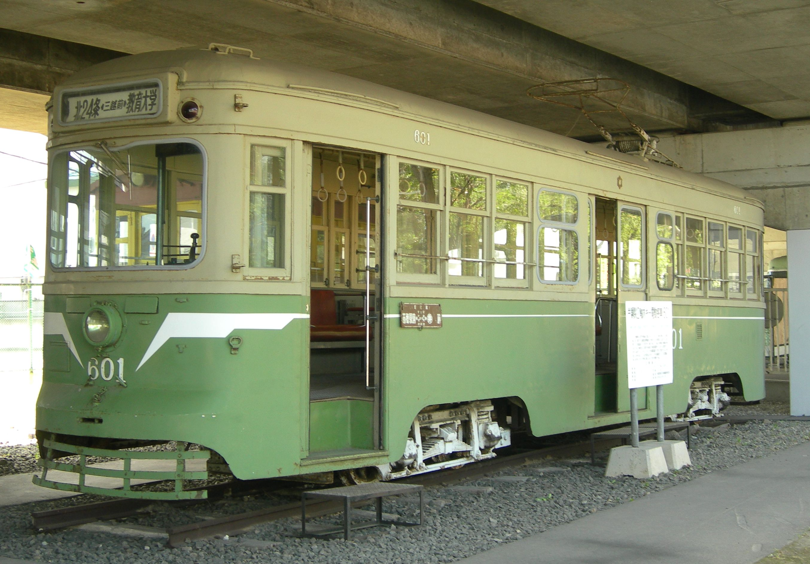 札幌市交通局600形電車601（615）号